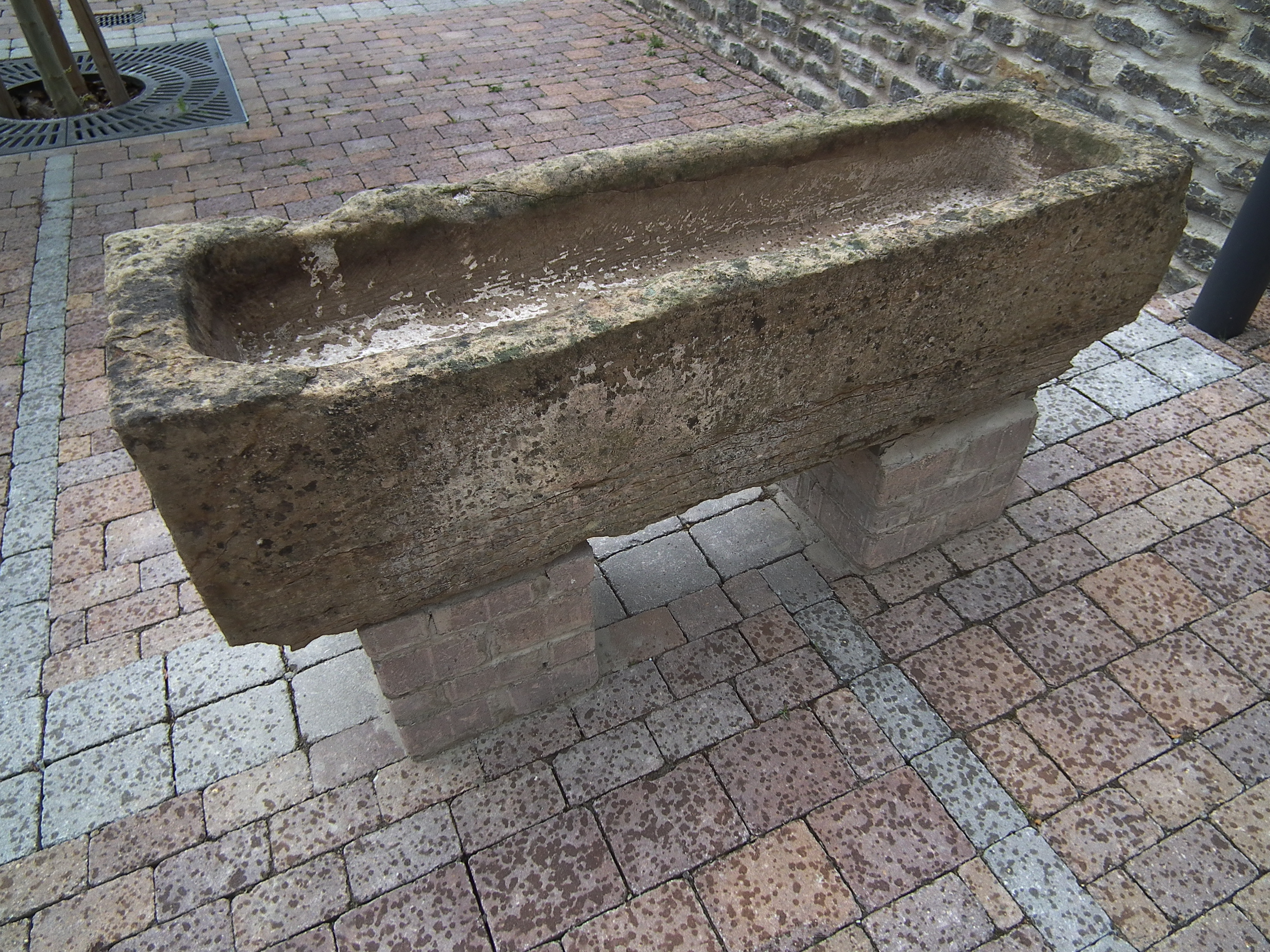 Pferdetränke vor der katholischen Kirche St. Sebastian in Zuzenhausen (Baden-Württemberg, Deutschland)